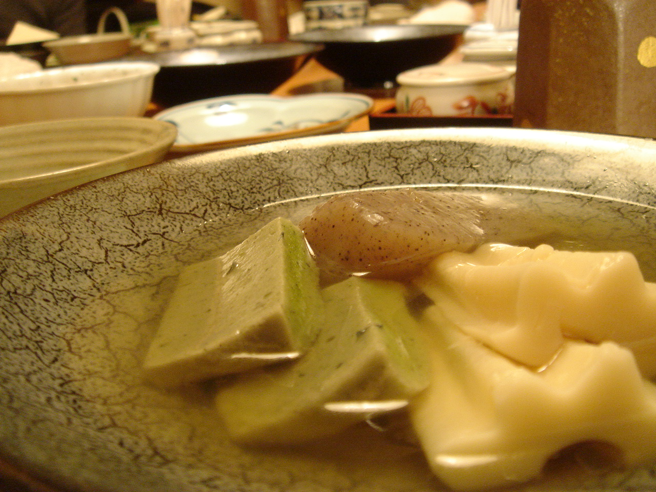 at riki, tokyooden